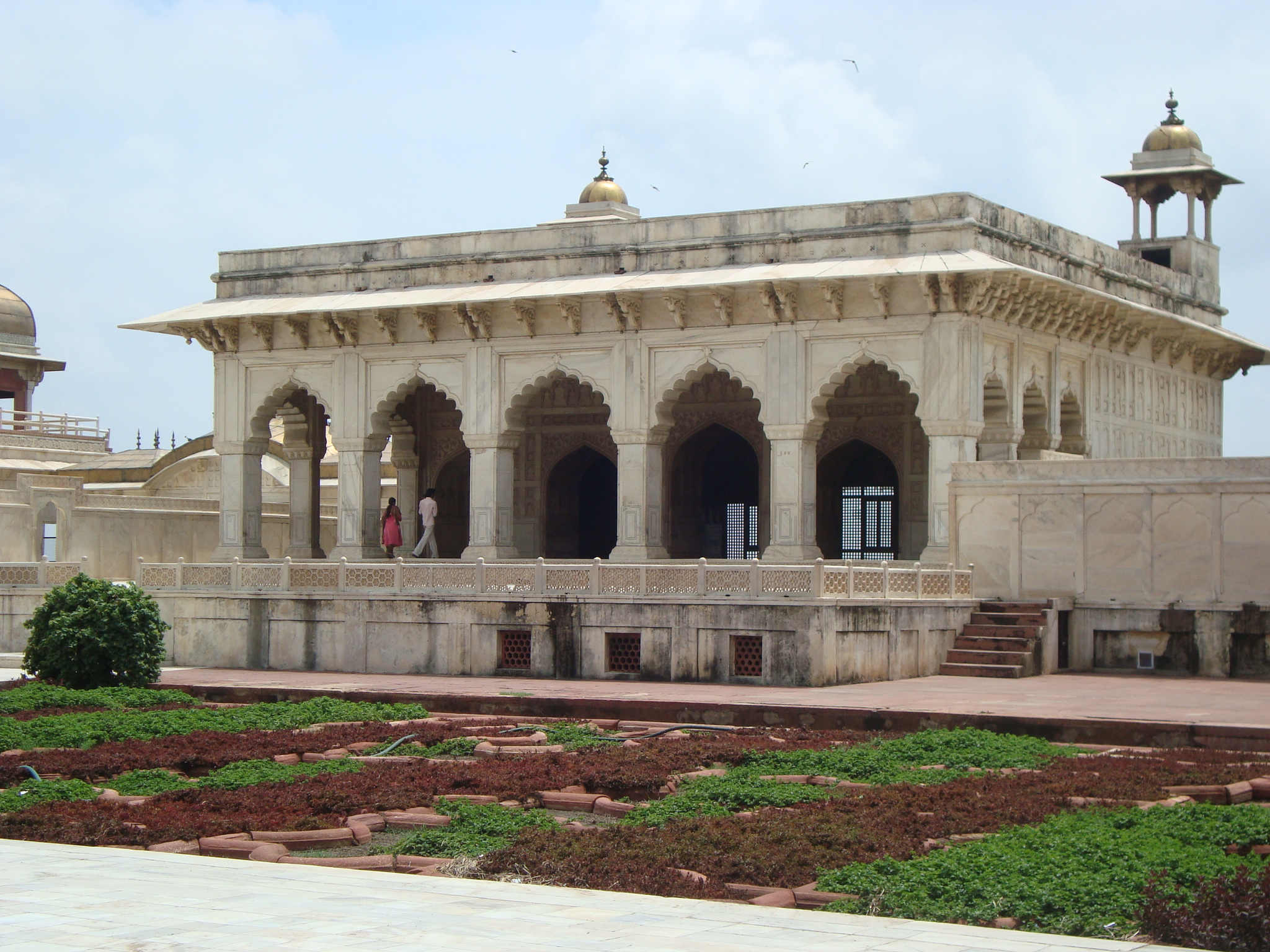 ആഗ്ര കോട്ടയിലെ ഖാസ് മഹൽ